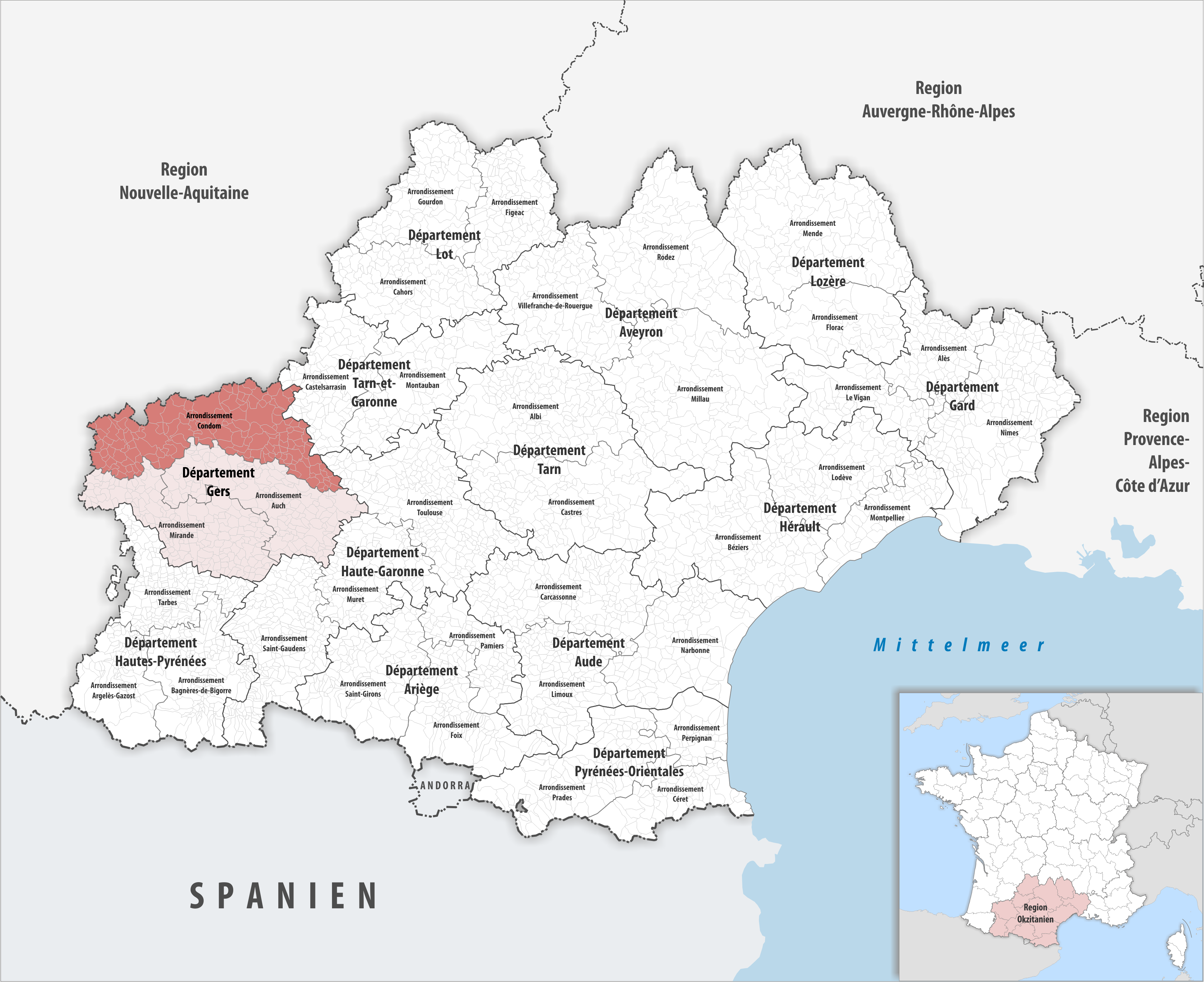 Lage des Arrondissements Condom